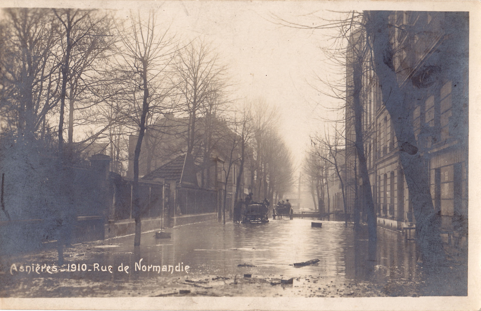 Carte-photo ancienne sans mention d'éditeur :ASNIERES - 1910 - Rue de Normandie